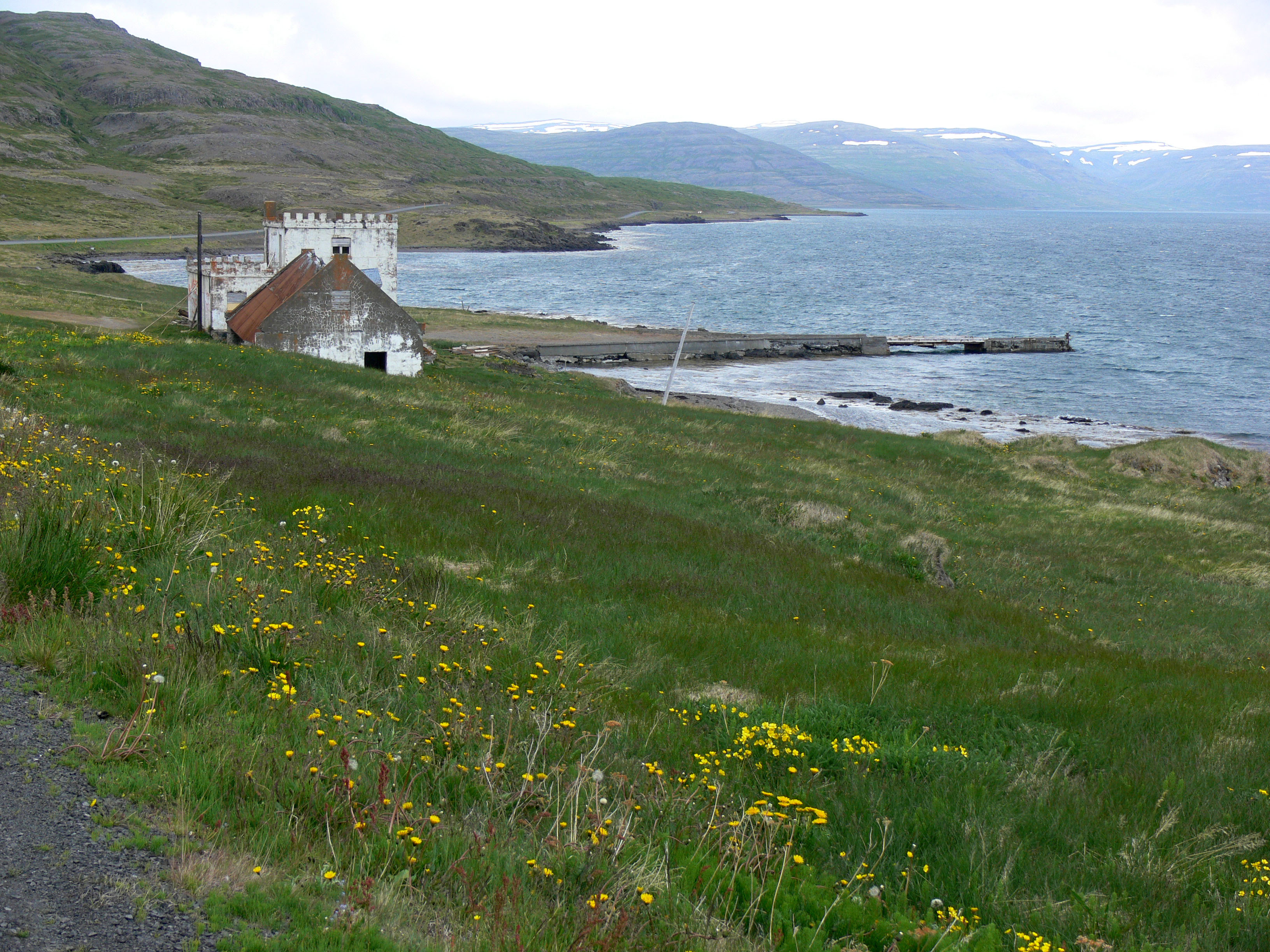 Arngerðareyri wurde 1920 am Ísafjörðurdjup gebaut. Es diente unter anderem als Handelsstation für die lokale Bevölkerung und als Telefonzentrale. Auf dem Grund Arngerðareyri befanden sich seit 1800 Gebäude die leider zum grössten Teil abgetragen sind.